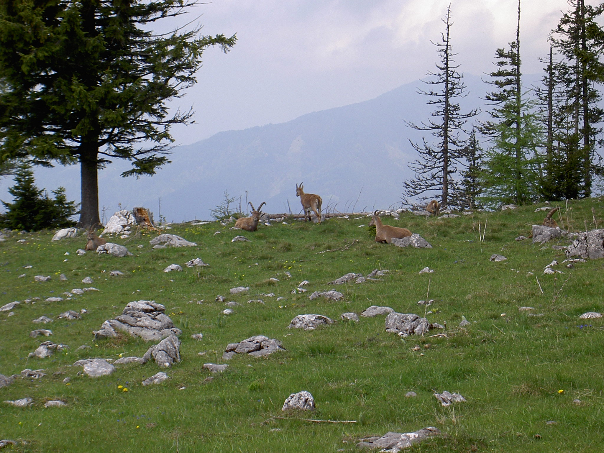 Steinbockkolonie (Capra ibex) auf der Roten Wand (Grazer Bergland, Steiermark)